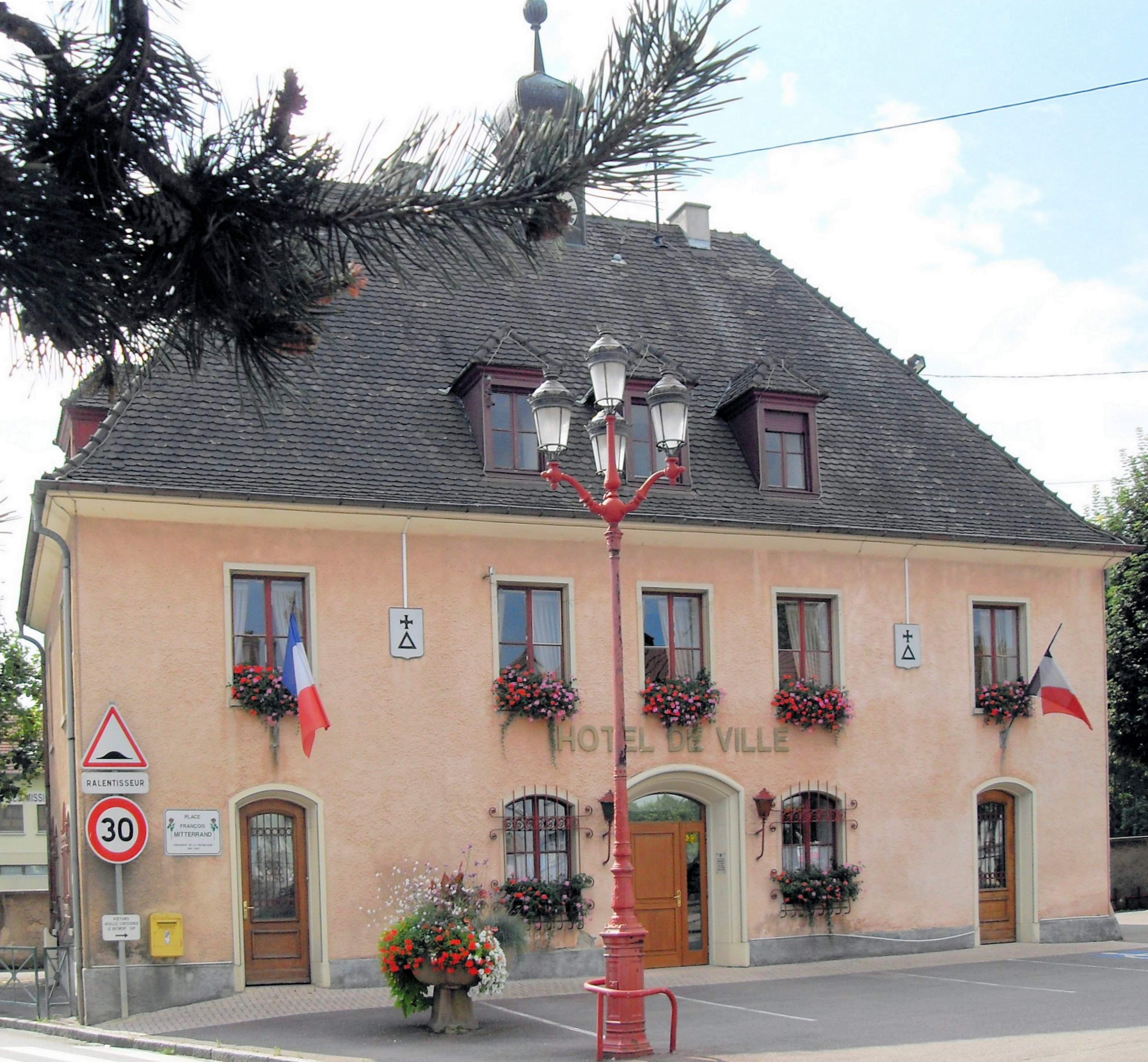 L' ancien hôtel de ville de Blotzheim